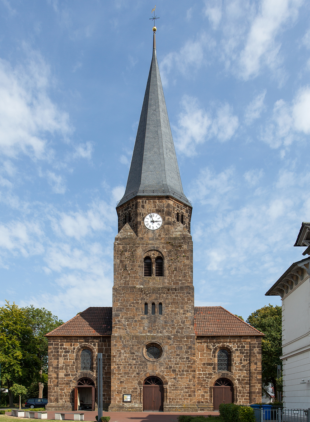 Laurentiuskirche in Rehme (Bad Oeynhausen) This is a photograph of an architectural monument.